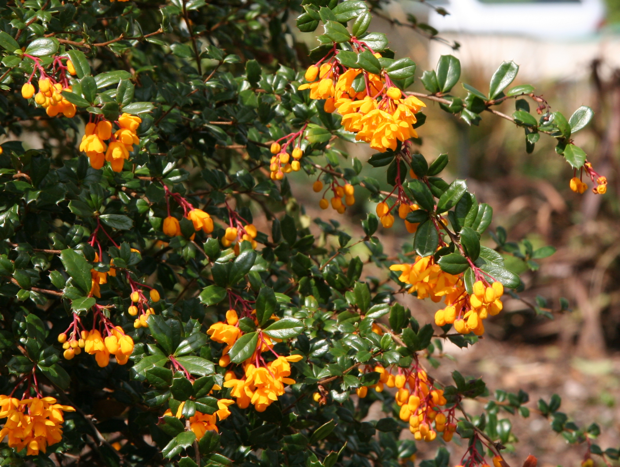 Berberis darwinii im Botanischen Garten Dresden